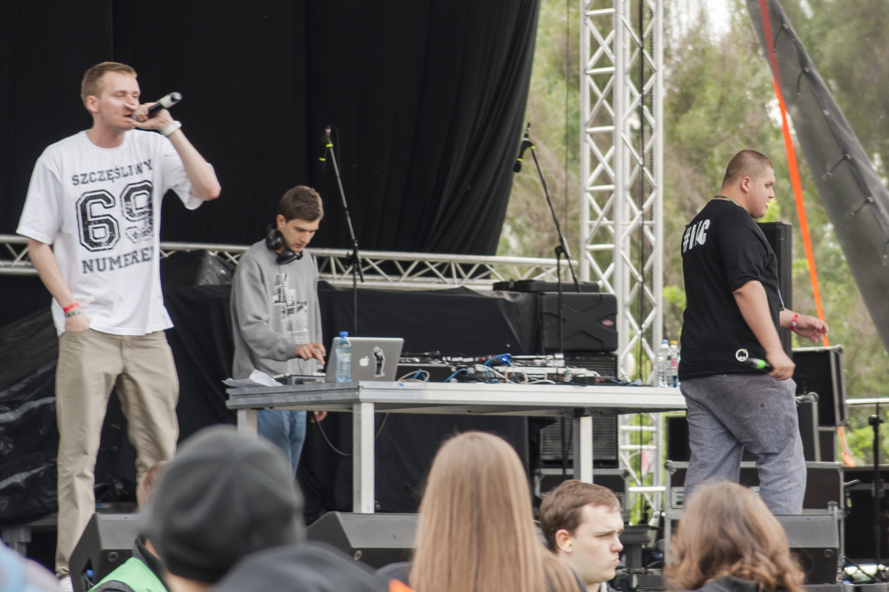 Raper Buka na festiwalu Ursynalia 2014